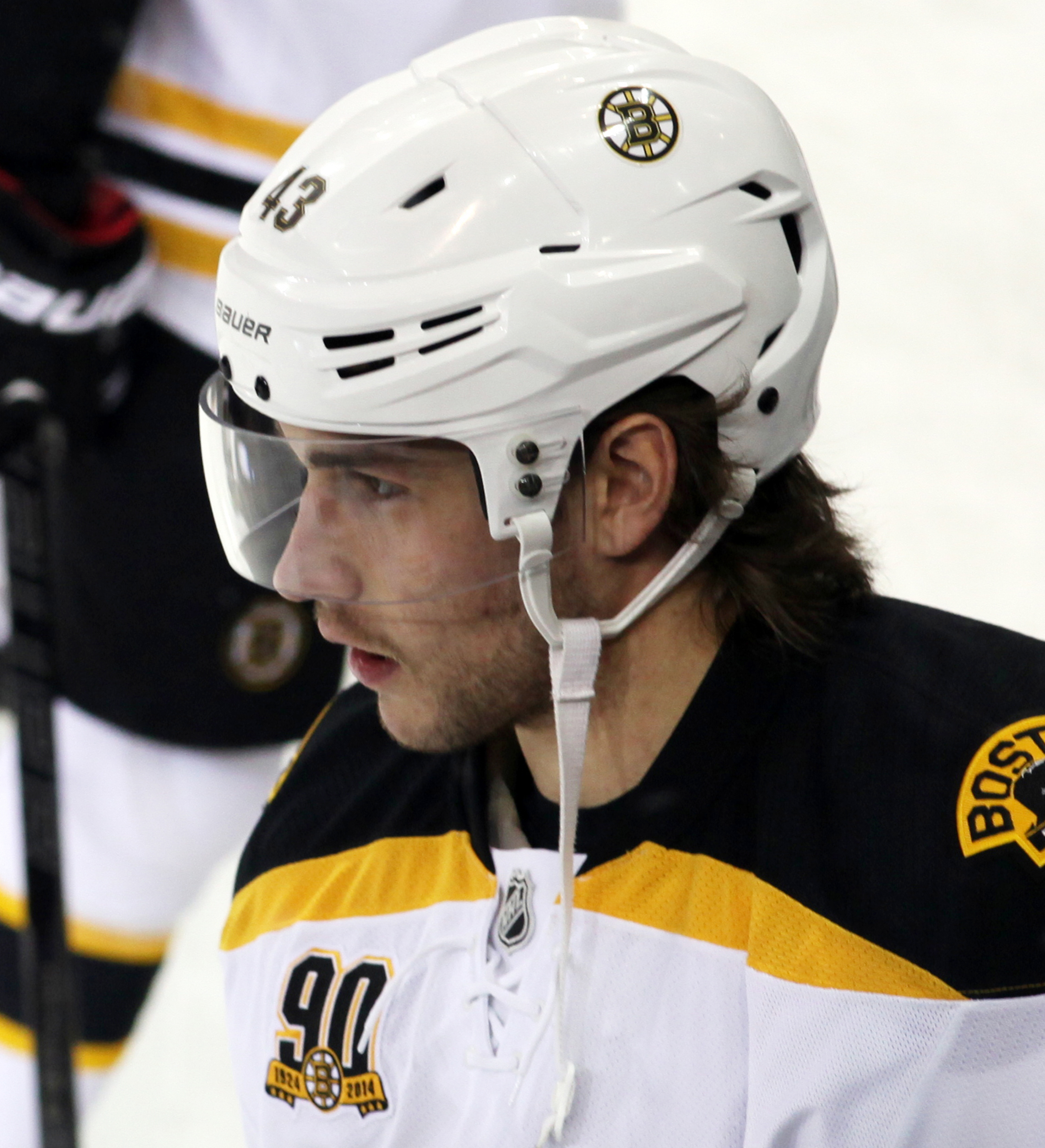 Bartkowski in 2013.